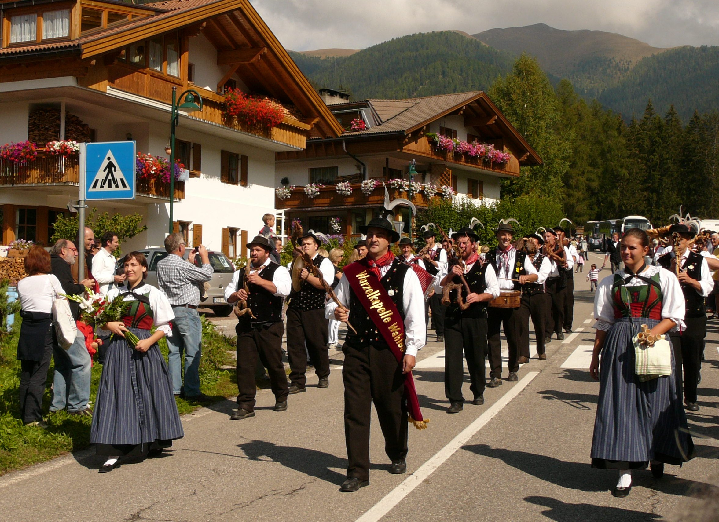 La banda musicale "Wurzelkapelle-Schramml" di Valle San Silvestro (Dobbiaco-BZ)